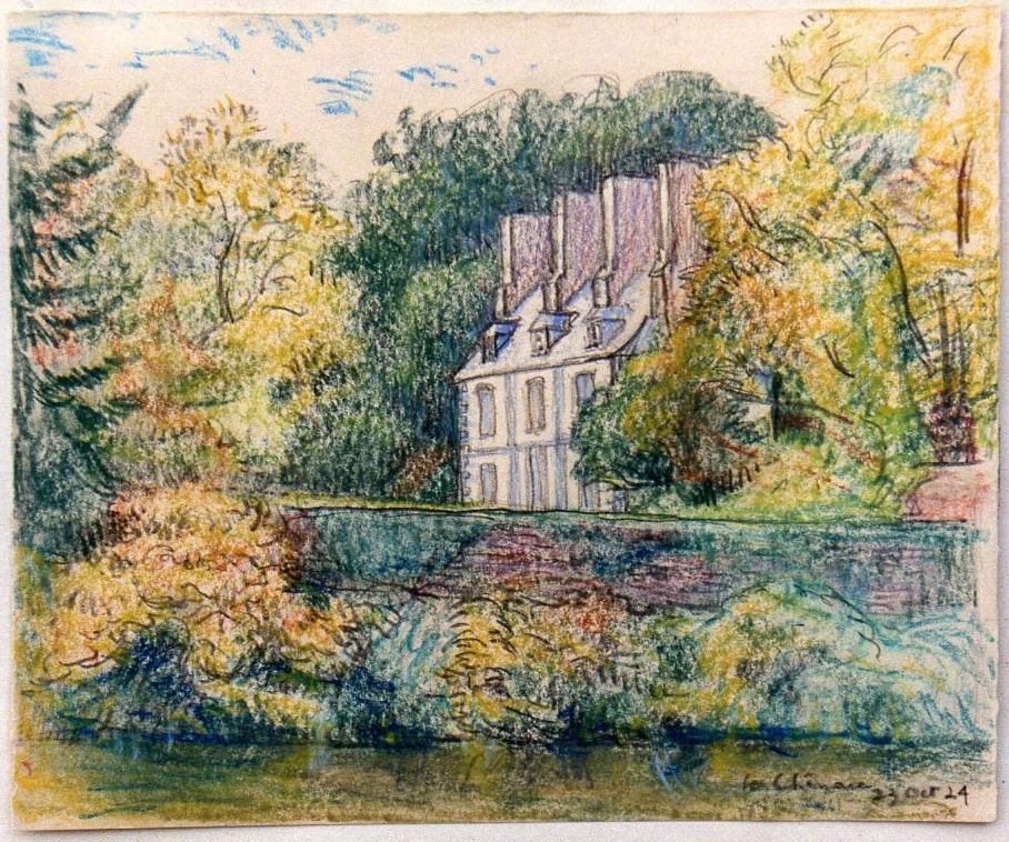 Lamennais: Malouinière en 35720 Plesder près de Dinan